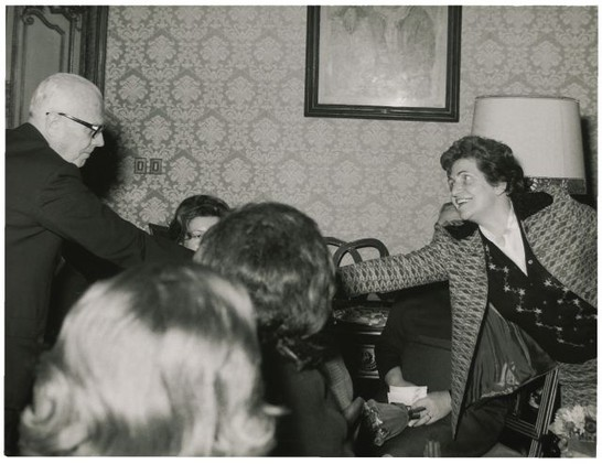 Il presidente della Camera dei Deputati Alessandro Pertini dona dei fiori alle deputate in occasione della festa della donna. Nella foto compare (a destra) Giulietta Fibbi. Data dell'evento 8 marzo 1973